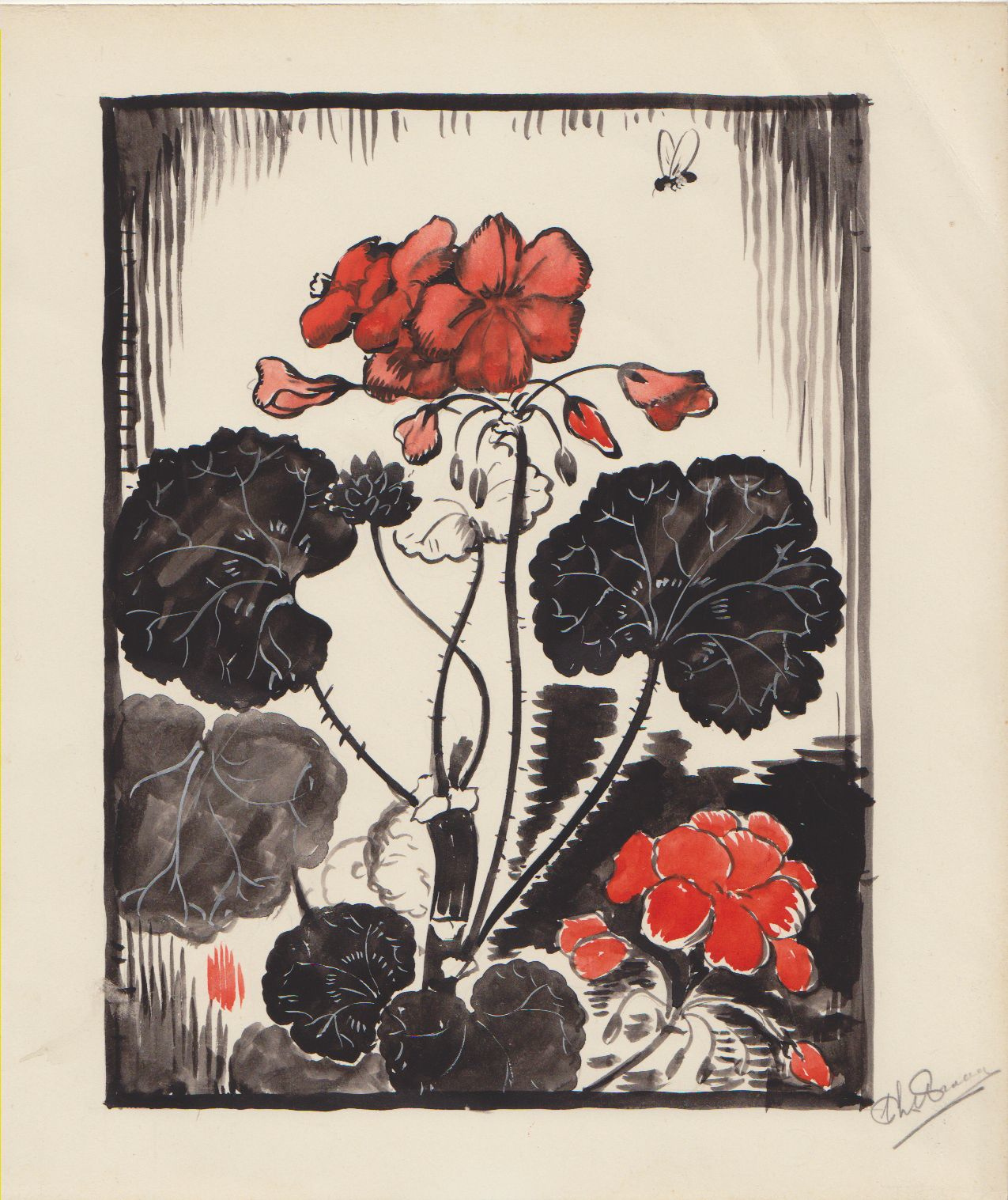 Vanuit een werkkamp in Hummelo, waar Philip van Praag in de oorlogsjaren terechtkwam, werd hij doorgezonden naar het vernietigingskamp Auschwitz. Uit Hummelo stuurde hij zijn vrienden nog een linoleumsnede in zwart met een vuurrode pelargonium